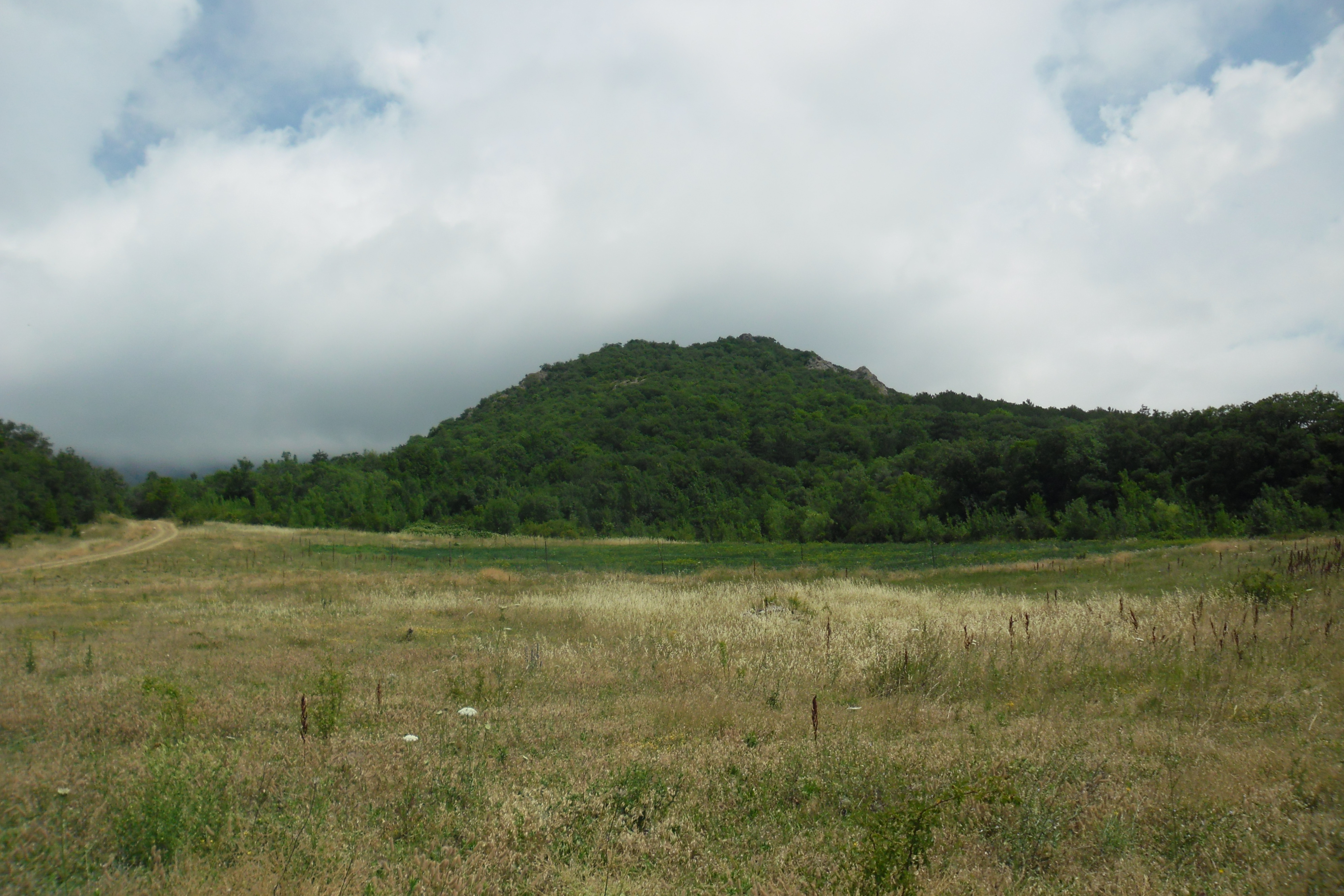 Хир та Ісмолос